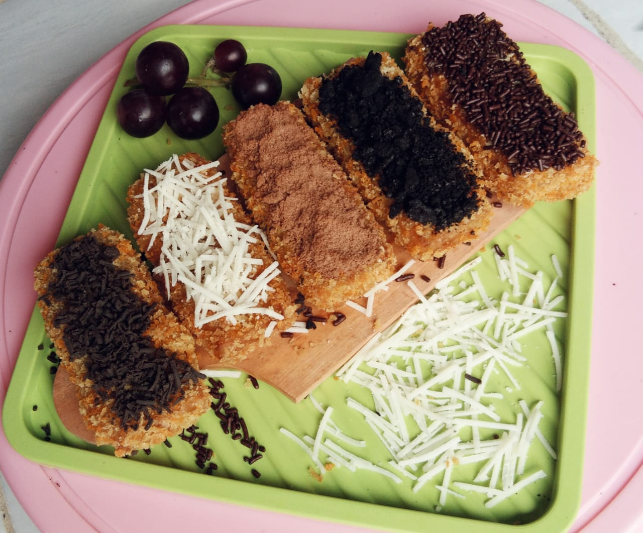 Basa Jawa: Nugget Gedhang yaiku sawijining panganan kang modern utawa ing bahasa saiki yaiku kekinian kang bakale saka gedhang kang dicampur karo glepung lan endog banjur dikukus lan banjur digoreng. Supaya tambah enak, biasane nduwure diwenehi werna-werna topping.